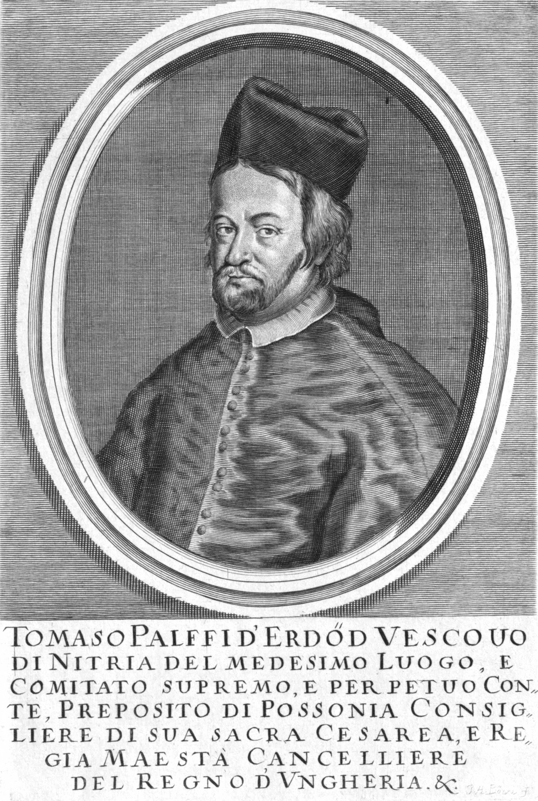 (1620-1679) esztergomi kanonok, nagyprépost, pozsonyi és jászói prépost, váci, egri, majd nyitrai püspök, kancellár.